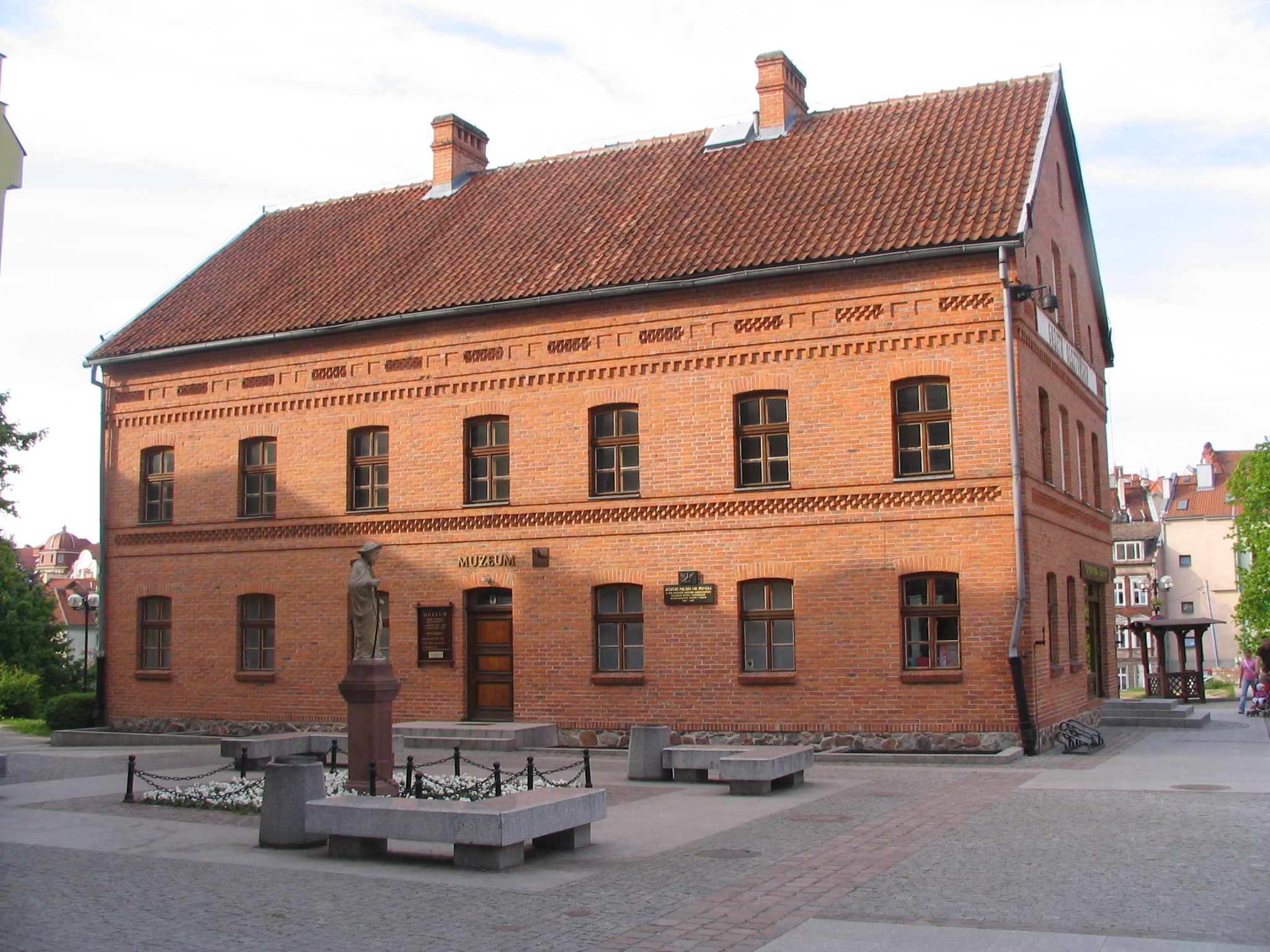 Dom Gazety Olsztyńskiej w Olsztynie